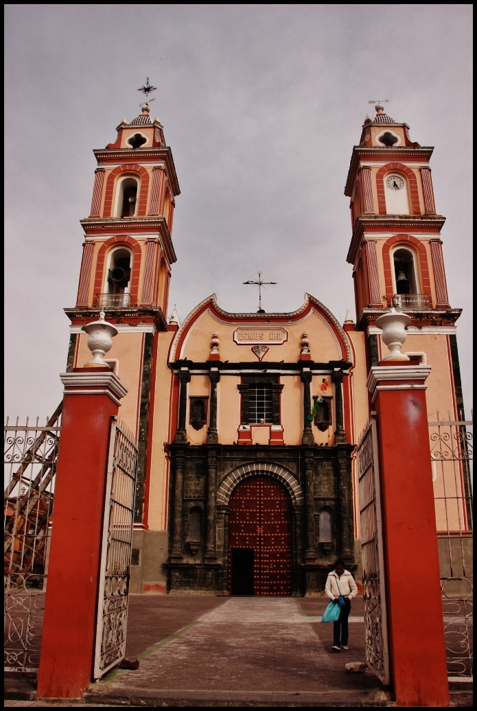 Parroquia de la Santa Cruz. Tlacotepec, Puebla, México.